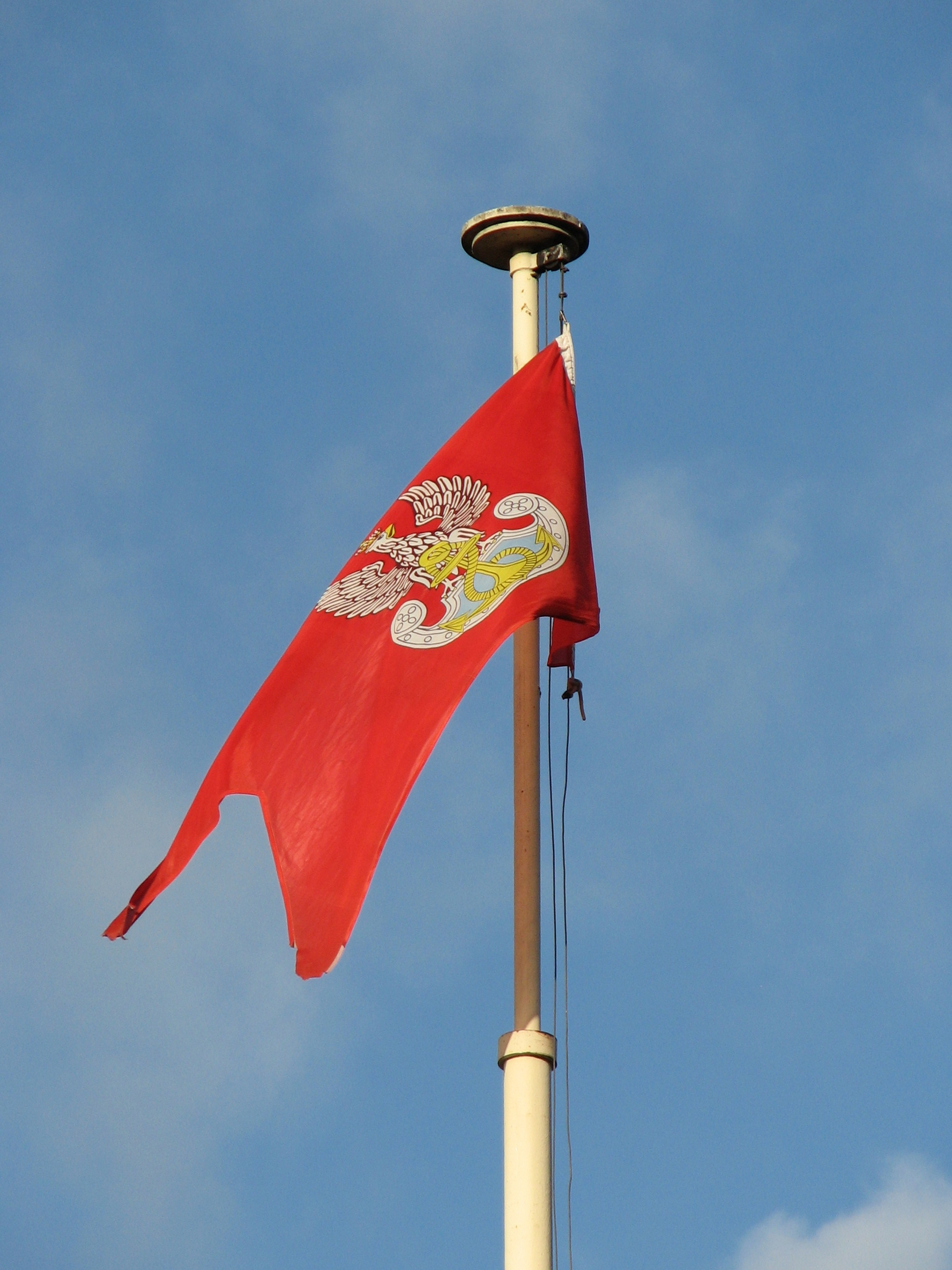 Flaga Marynarki Wojennej na budynku Komendy Portu Wojennego Gdynia (3 Flotylla Okrętów).